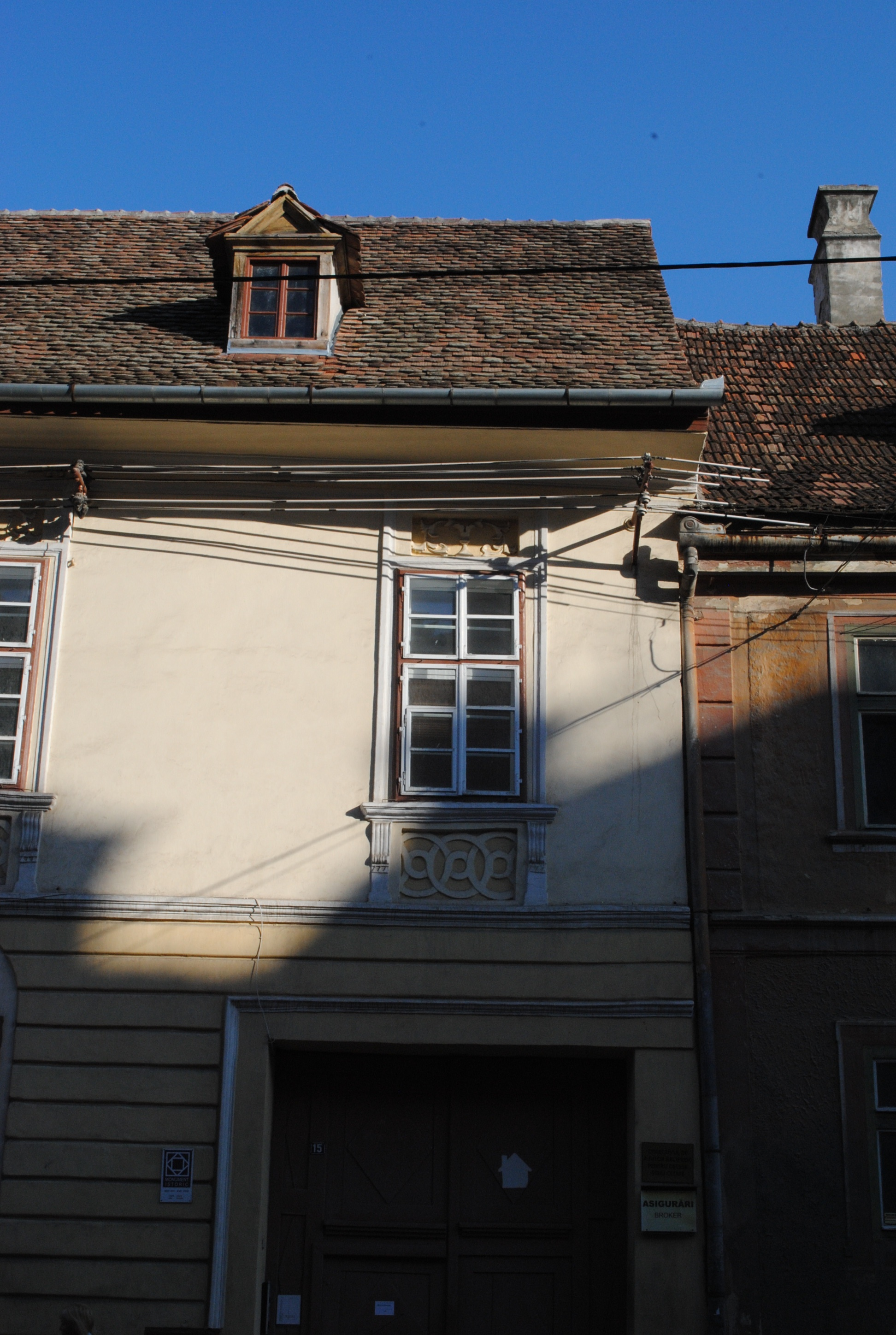 Casă, sec. XVI - XVII,1750 - 1800